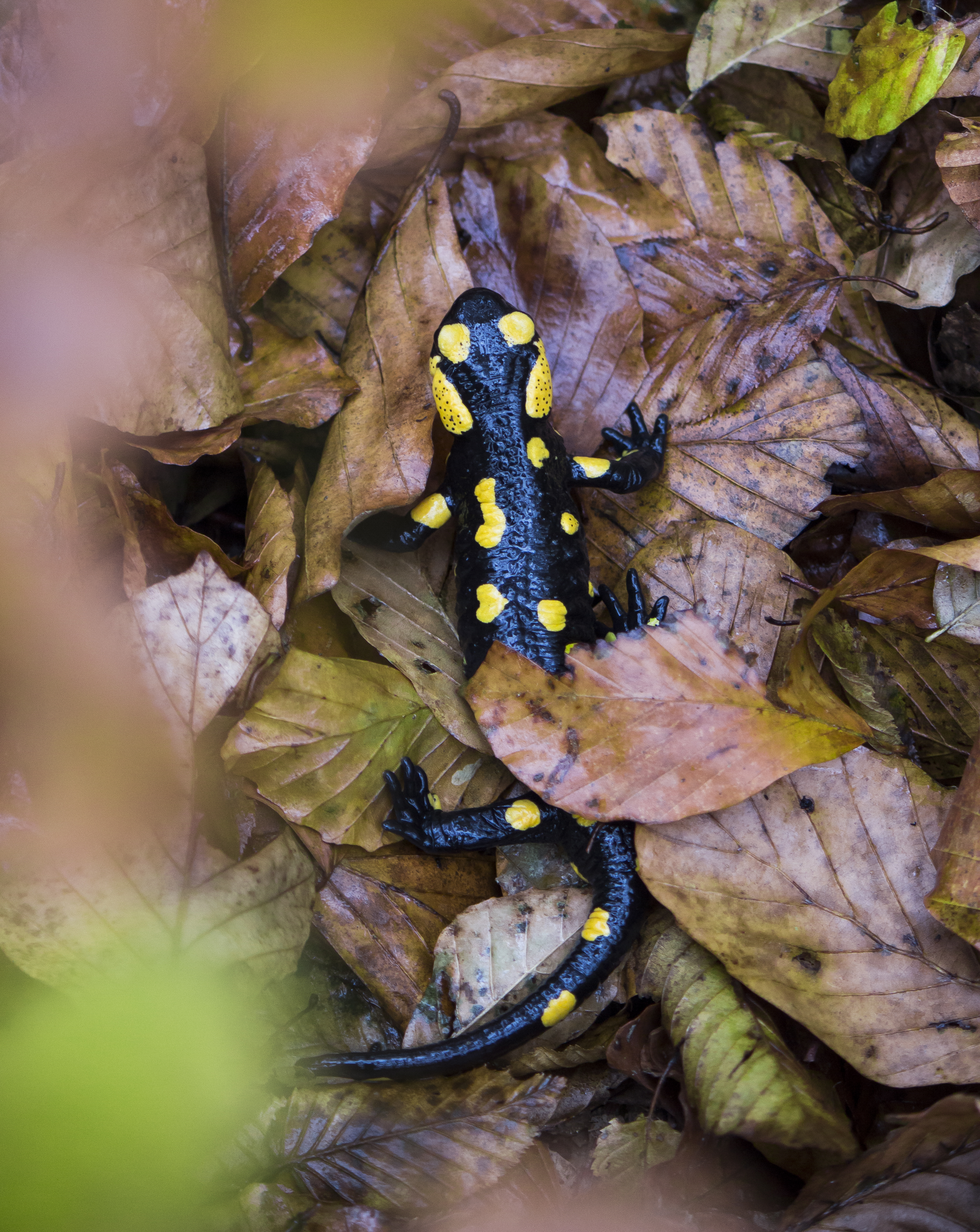 Шуменско плато